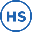 阪神電気鉄道の路線記号。DejaVuフォントで作成